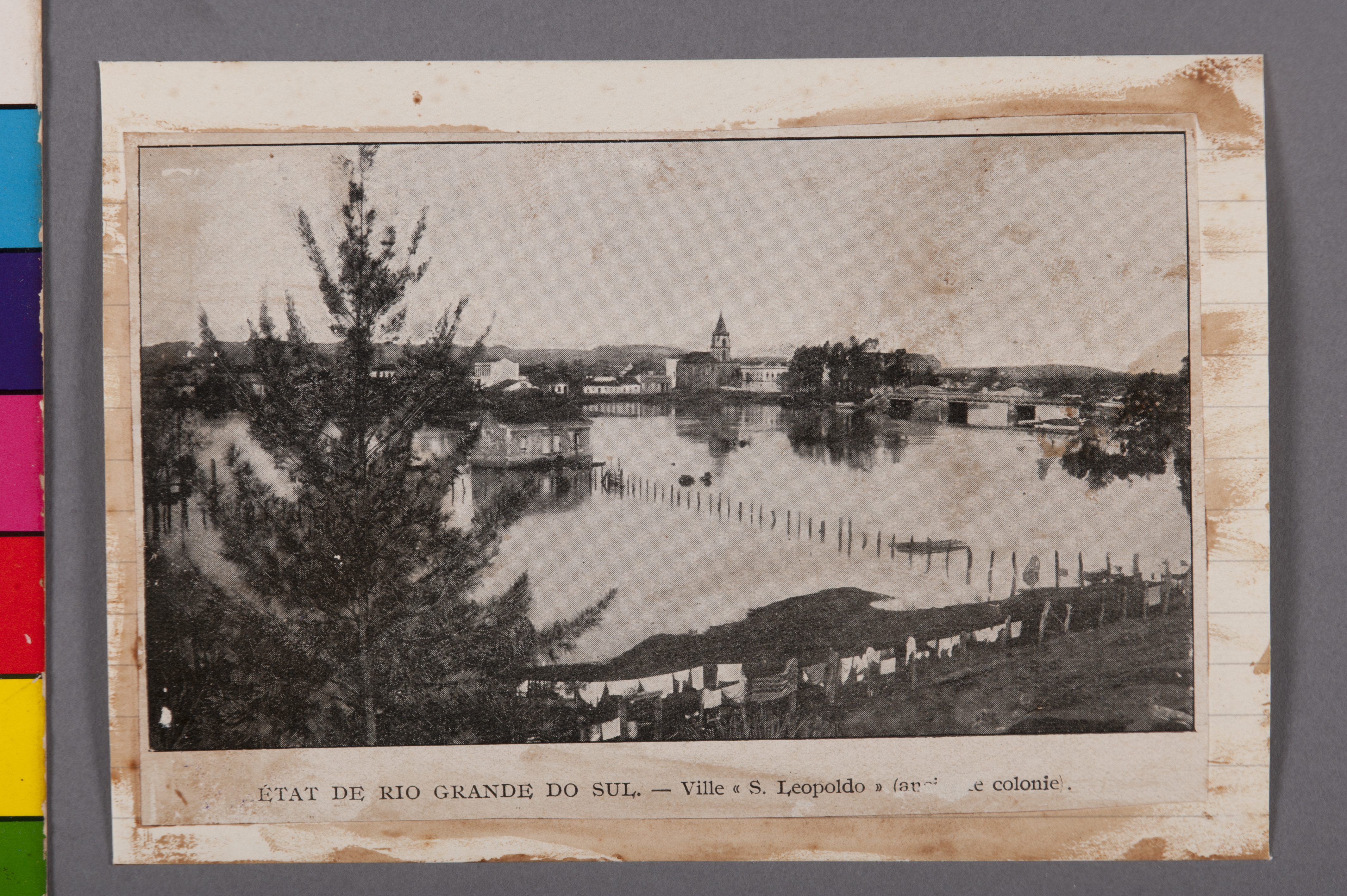 Obra que integra o acervo do Museu Paulista da USP. Coleção João Baptista de Campos Aguirra.